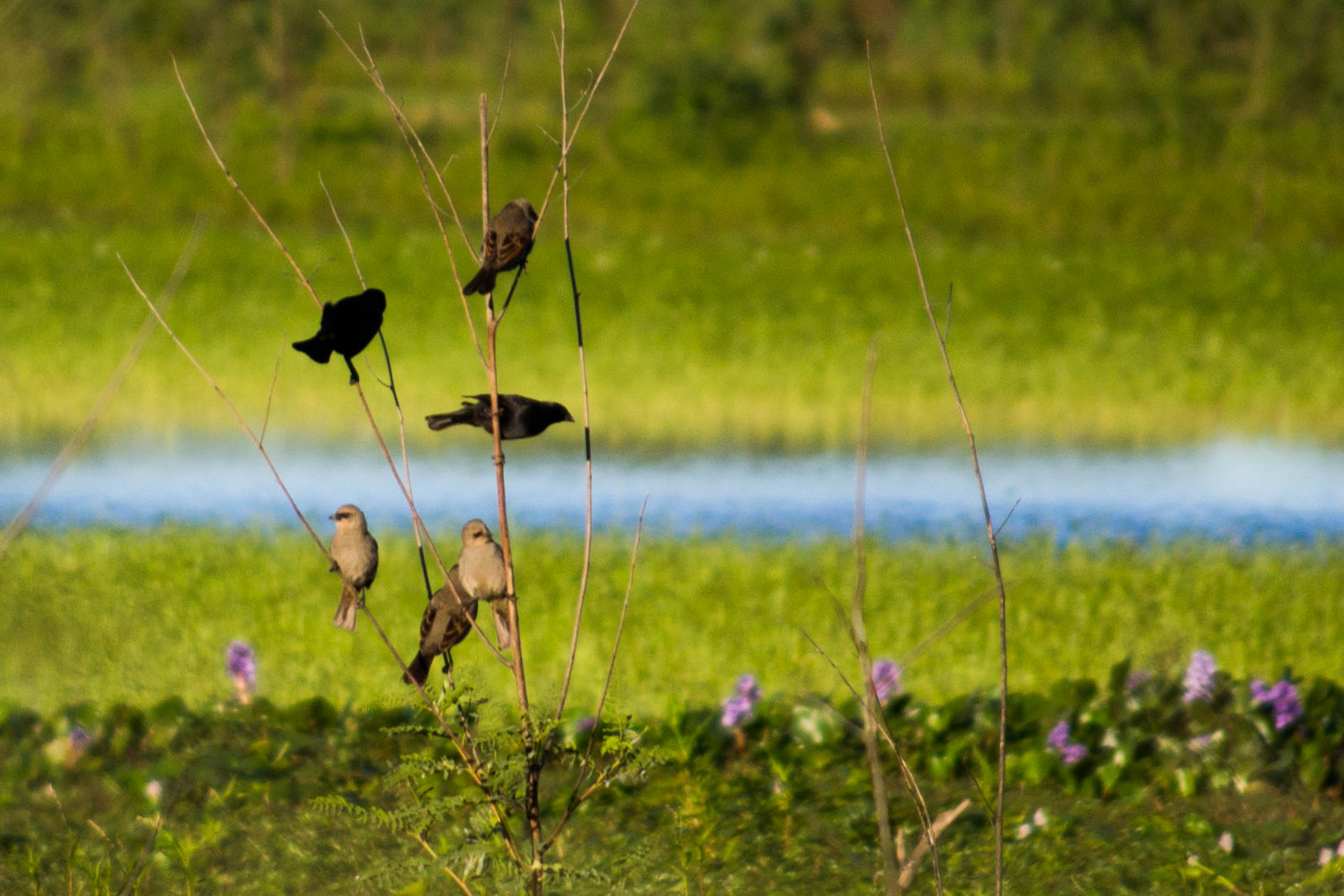 Pajaros - Litoral Argentino